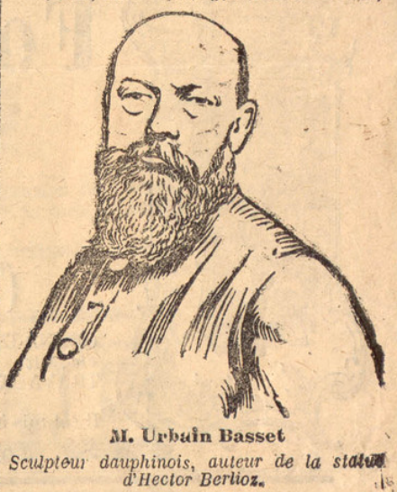 Le sculpteur grenoblois Urbain Basset (1903)